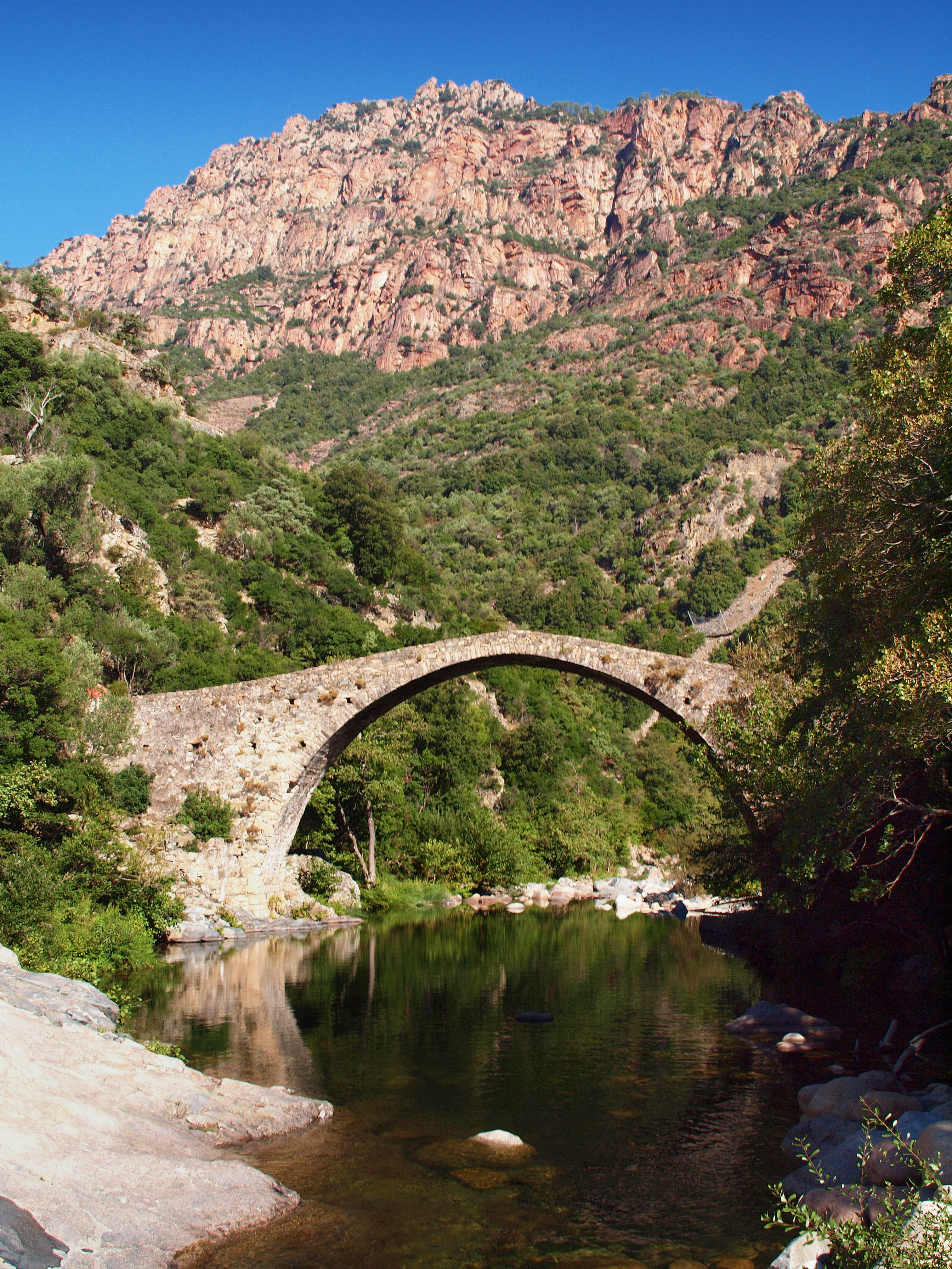 Ota (Corsica) - Pont génois de Pianella sur la rivière Porto.